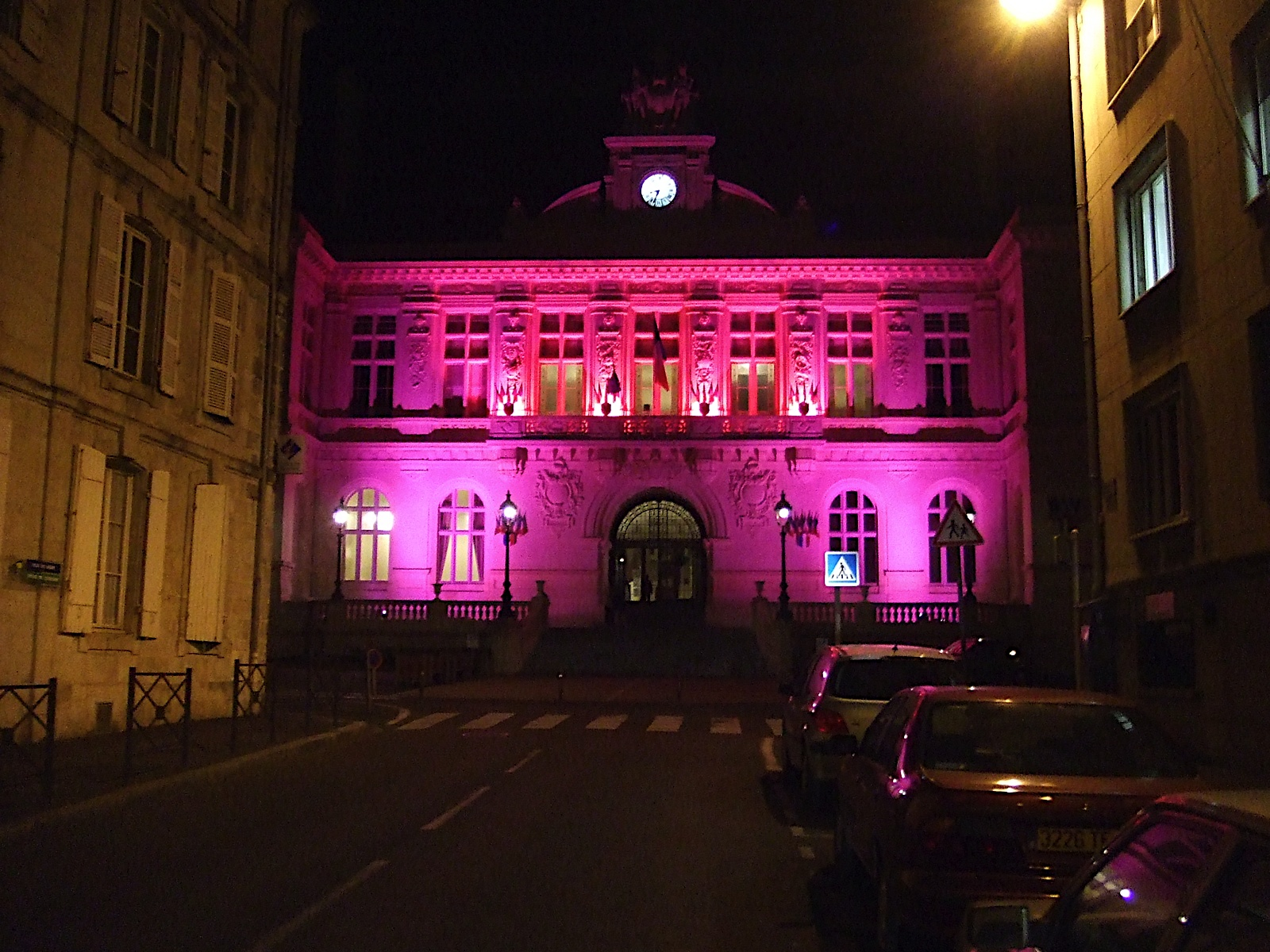 Mairie de Niort